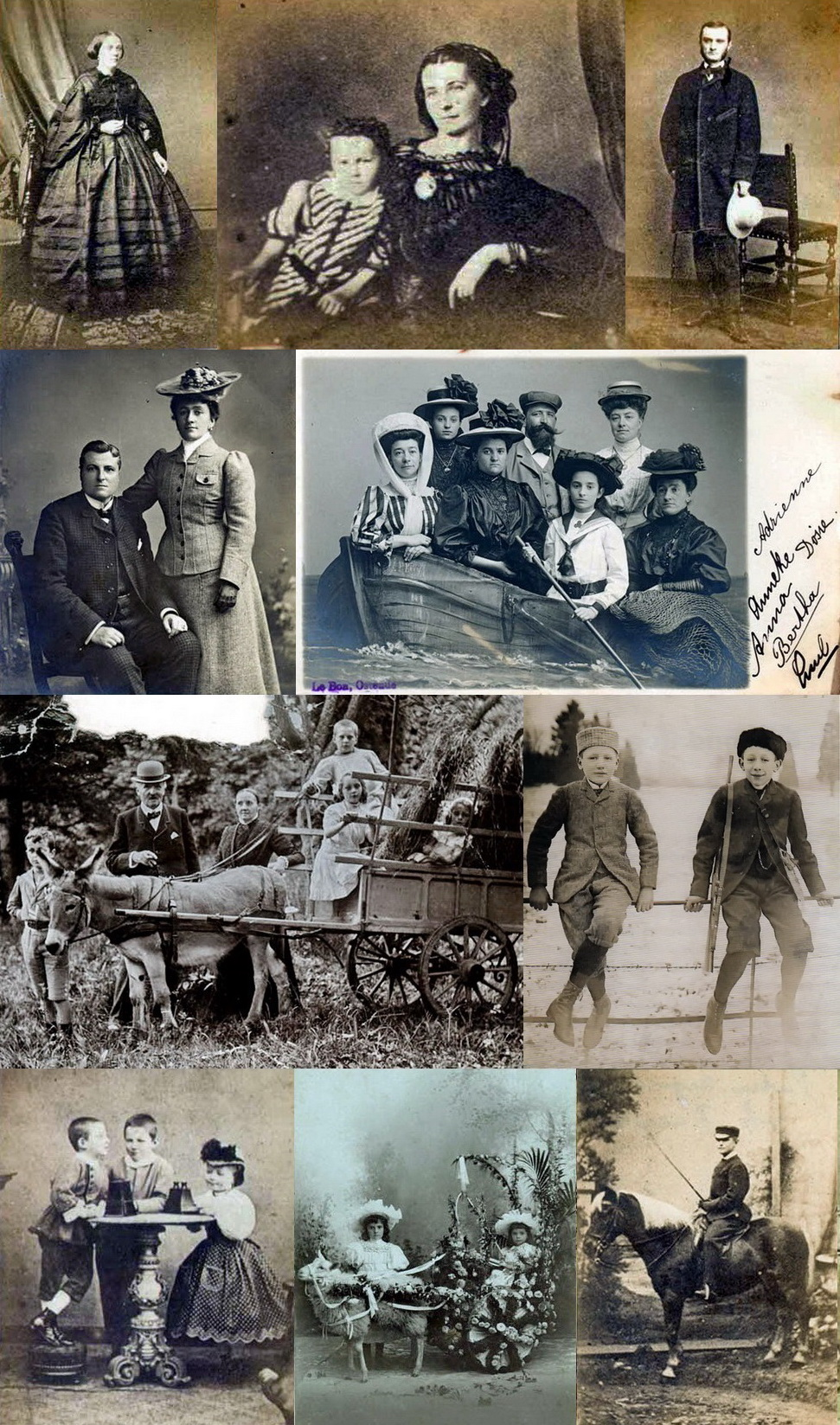 Fotocollage van de familie Regout uit het familiearchief in het RHCL te Maastricht. De montage is samengesteld door Kleon3. Alle foto's met vrije licentie afkomstig van Wikimedia Commons: File:Maria Gertrudis Hubertine Weustenraad-Regout (1826-1898).jpg File:Carolina Hortensia Victoire Regout-Bonhomme (1831-1861).jpg Hubert Gérard Louis Regout (1832-1905).jpg File:Maxime Regout (1864-1906) & Anna Rutten (1865-1917).jpg File:Familiefoto Regout, Rutten & Meuwissen, 1905.jpg File:Familiefoto Regout-Kersten, ca 1865.jpg File:Eduard & Adolf Regout, 1889.jpg File:Kinderen Regout-Bonhomme, ca 1865.jpg File:Anna & Theodosie Regout, ca 1895.jpg File:Petrus Hubertus Regout (1854-1928), ca 1863.jpg